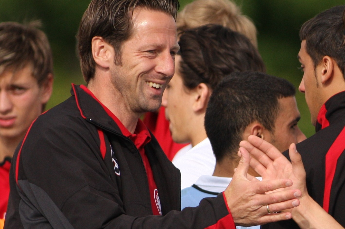 Uwe Bindewald als Co-Trainer Eintracht Frankfurt U19; nach Sieg im Hessenpokalfinale gegen OFX